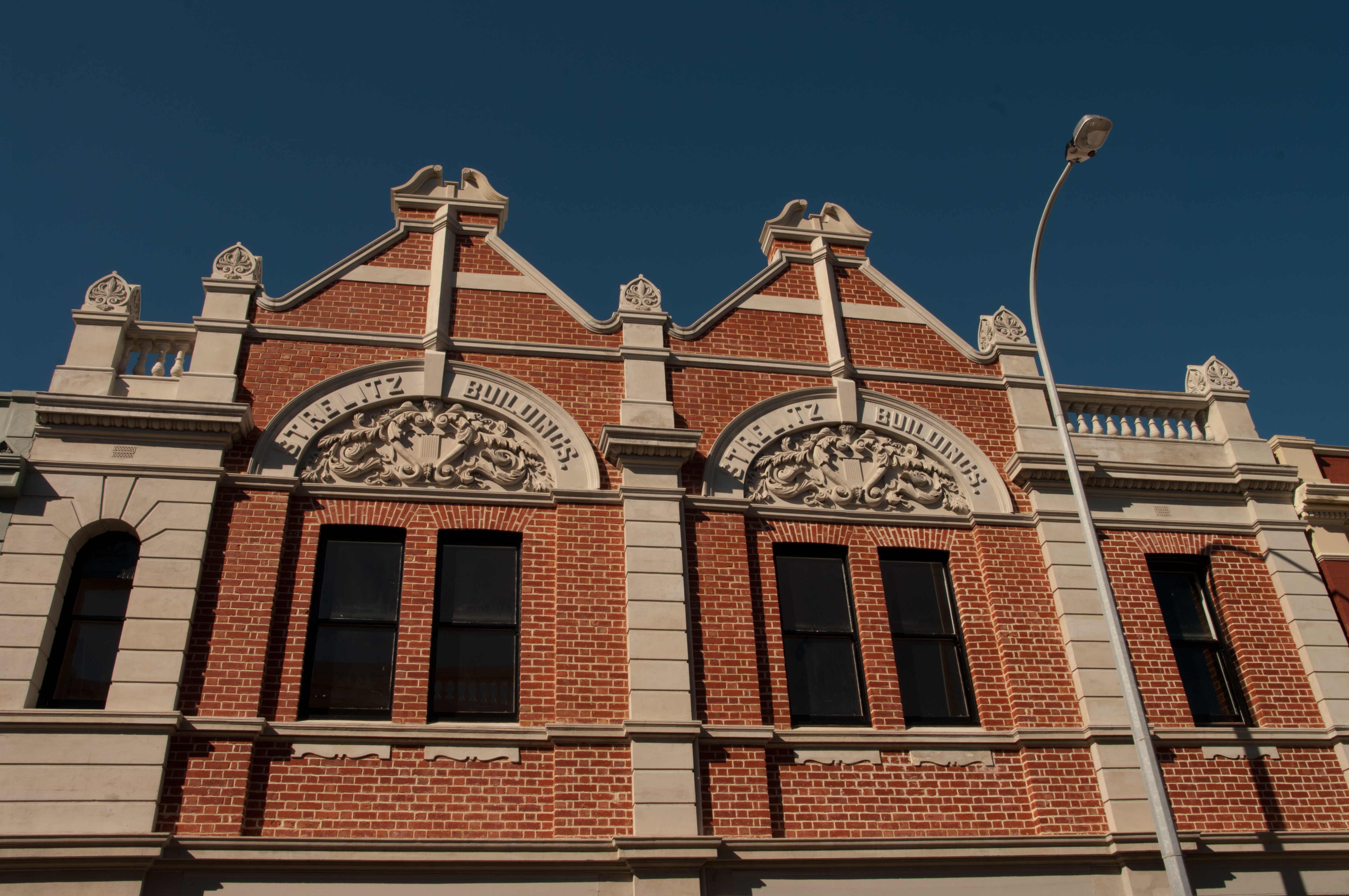 Strelitz Buildings